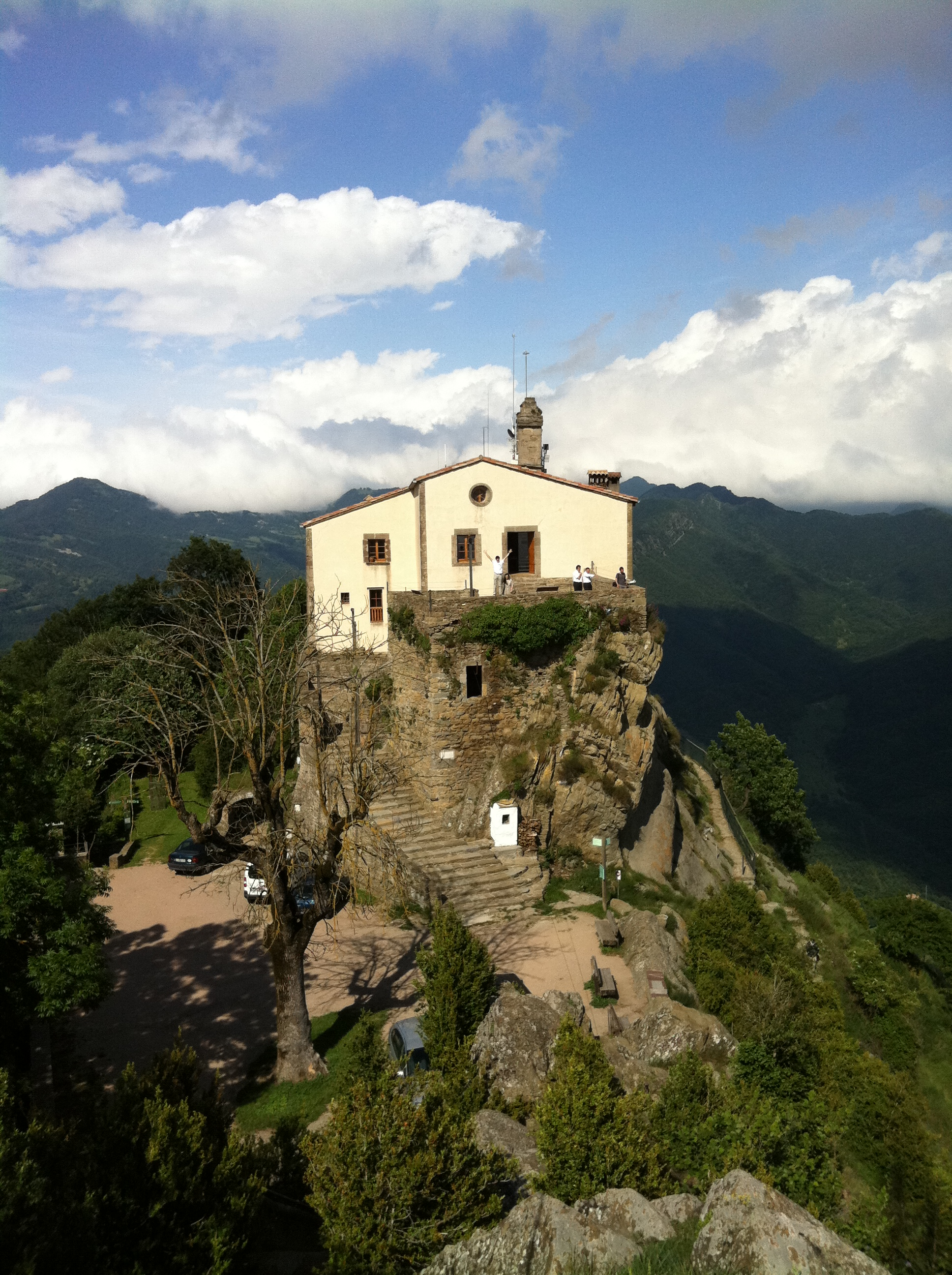 Santuari de Bellmunt Santuari de Bellmunt